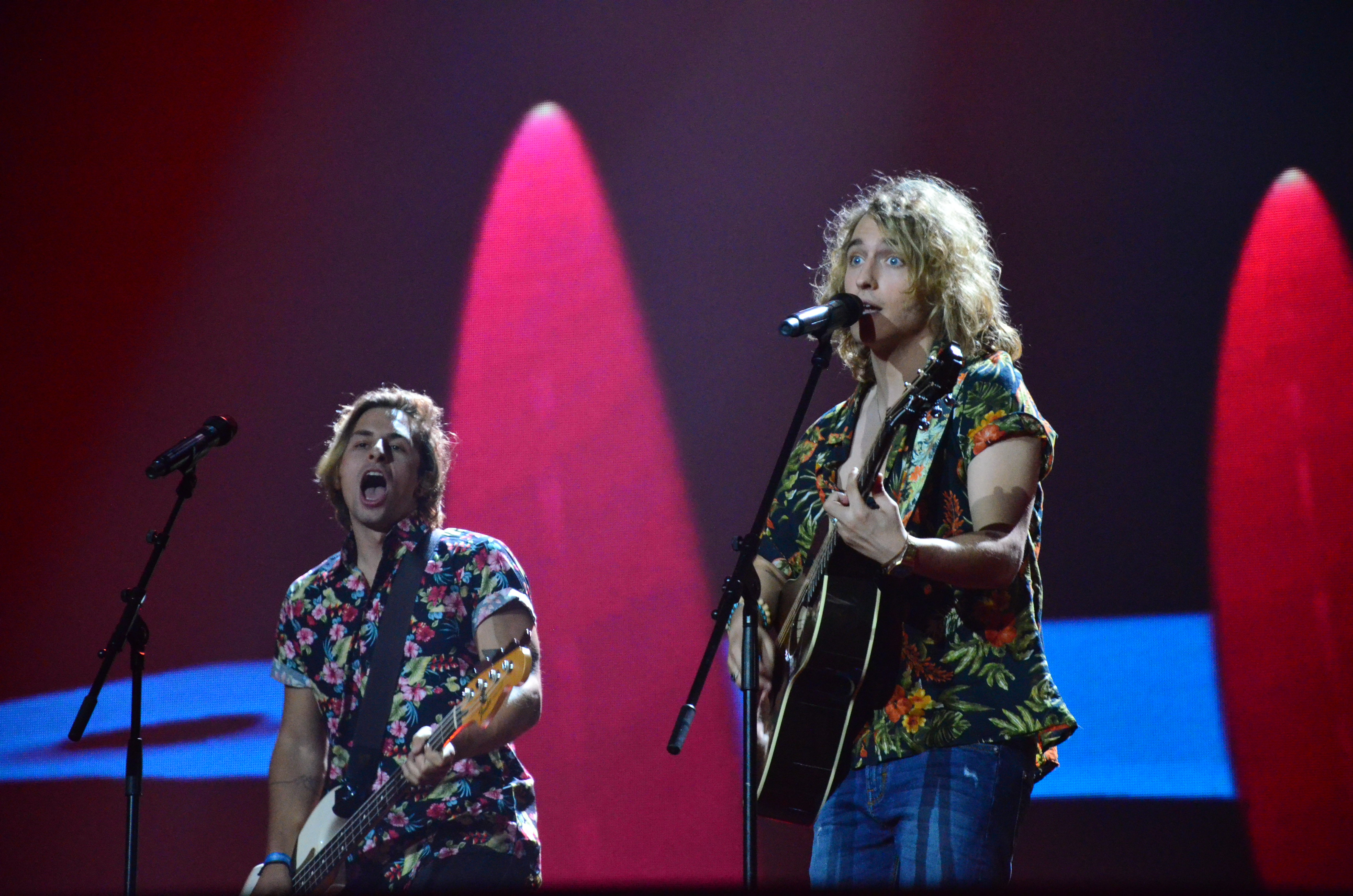 12 травня. Генеральна репетиція фіналу Євробачення 2017. Manel Navarro (Spain).